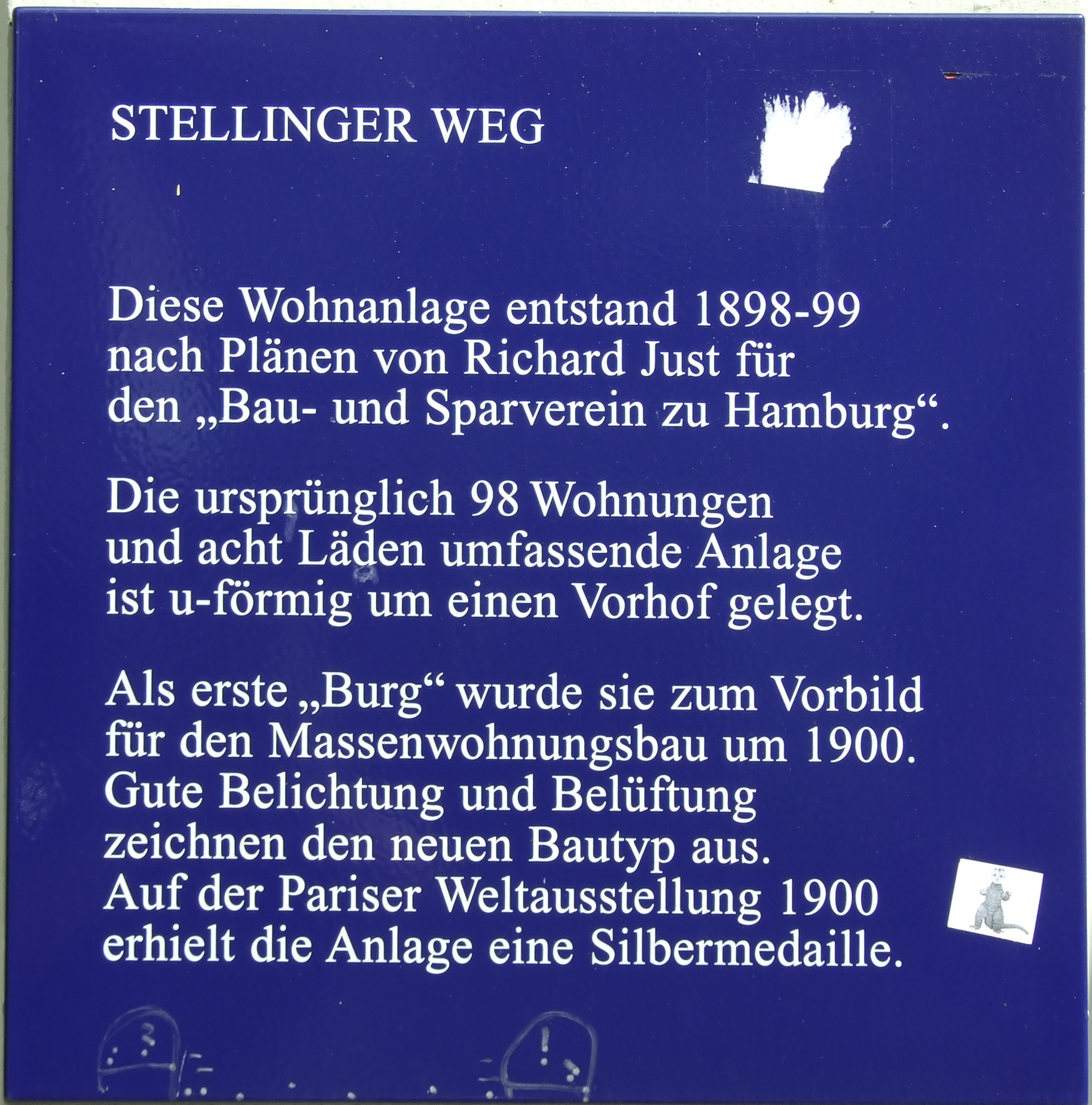 Stellinger Weg - Hamburger Burg 1898-1899